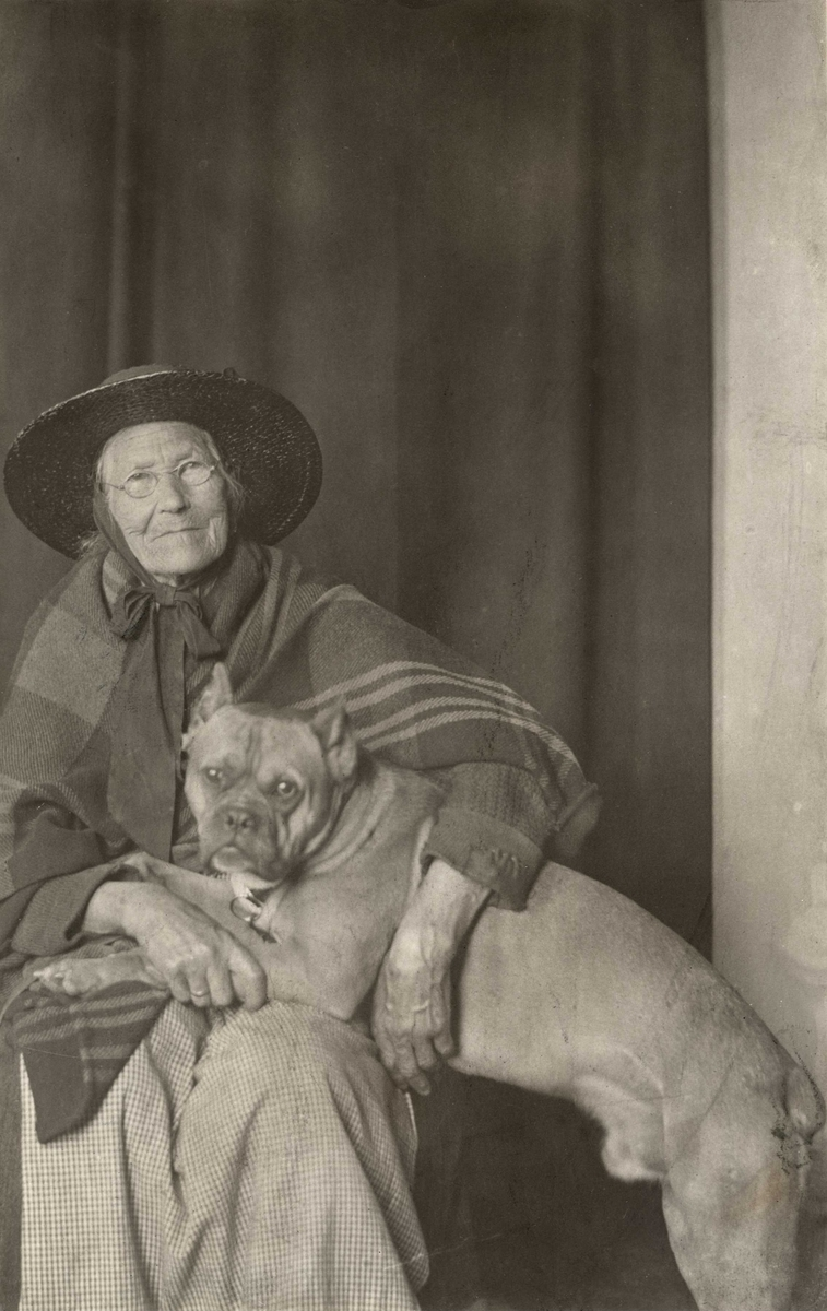 Lisa Kristoffersen, stifteren av den første foreningen for dyrebeskyttelsen,i Kristiania i 1907